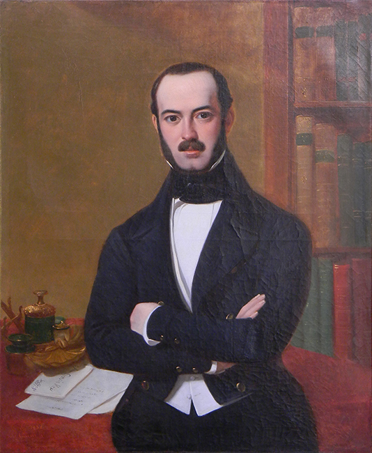 RETRATO DE DON ANTONIO GARCÍA REYES Ciccarelli, Alejandro (1808-1879) ca. 1850 Óleo sobre tela 128,5 x 107 cm Museo Nacional de Bellas Artes, Santiago, Chile Surdoc 2-5017